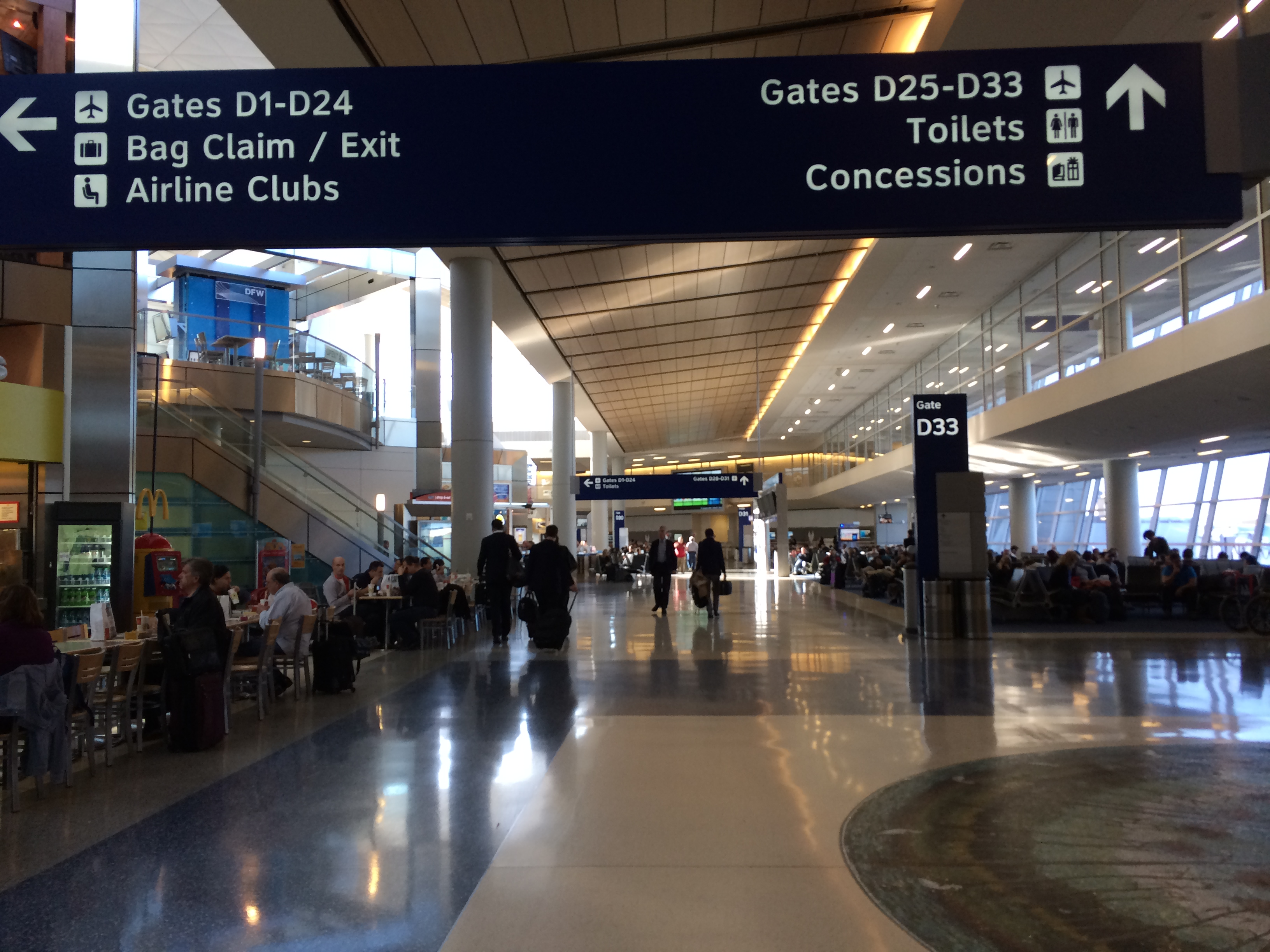 Interior de la Terminal D del aeropuerto de DFW.